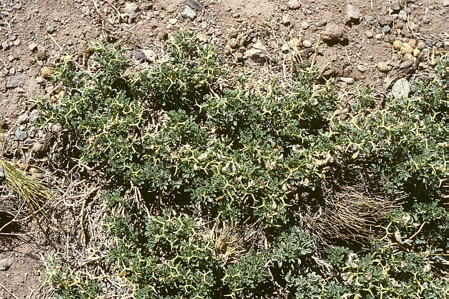 Adesmia echinus, Hülsenfrüchtler (Fabaceae), Schmetterlingsblütler (Faboideae) - Argentinien/Argentina, Paso de Uspallata, W Puente del Inca, ca. 2800 m s.m. (Prov. Mendoza)